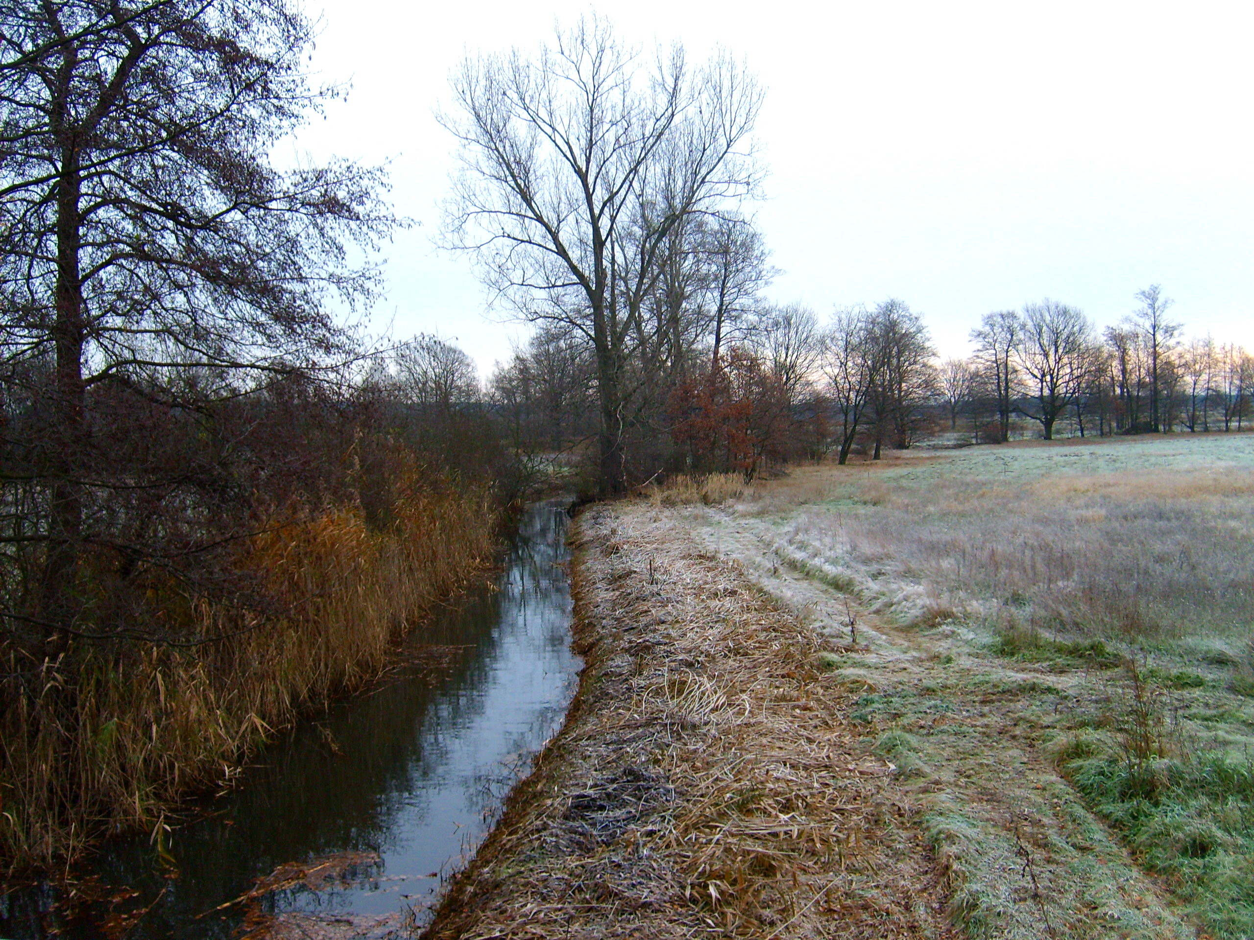 Alter Flußlauf bei Würdenhain.